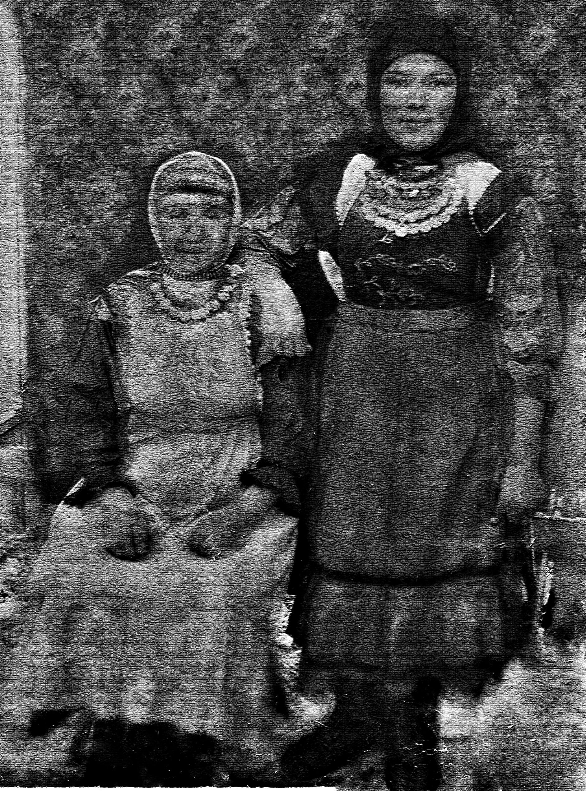 местная жительница села Эзекеево,чувашка анат енчи, педагог